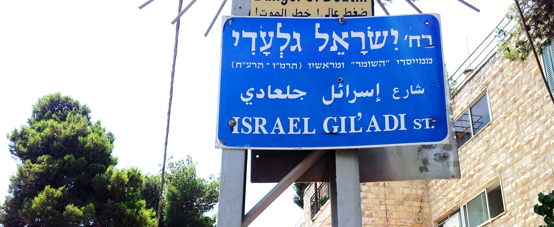 רחוב ישראל גלעדי בשכונת תלפיות בירושלים